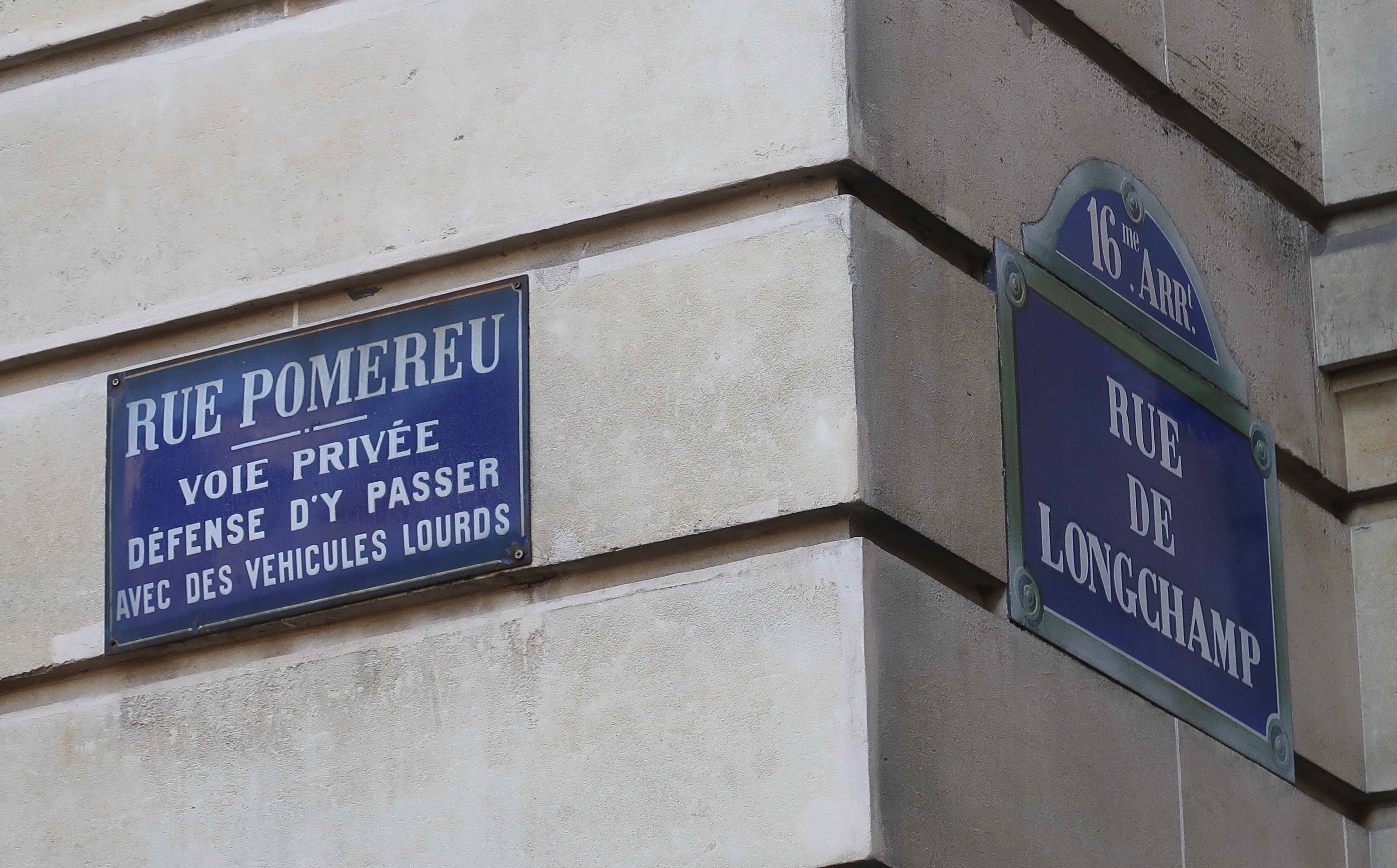 Plaque de la rue de Pomereu, à l'angle avec celle de la rue de Longchamp (Paris, 16e).